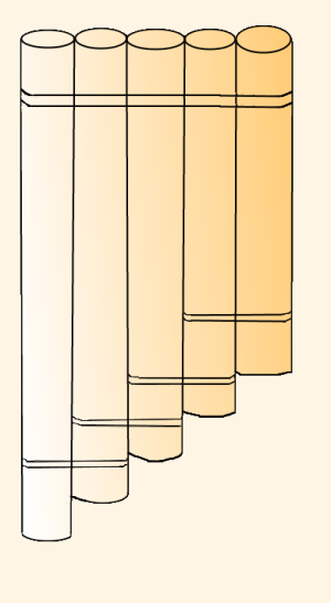 Кугиклы. На основе иллюстрации из книги "Бычков В. Н. Музыкальные инструменты. — М.: АСТ-ПРЕСС, 2000. ISBN 5-7805-0537-3"